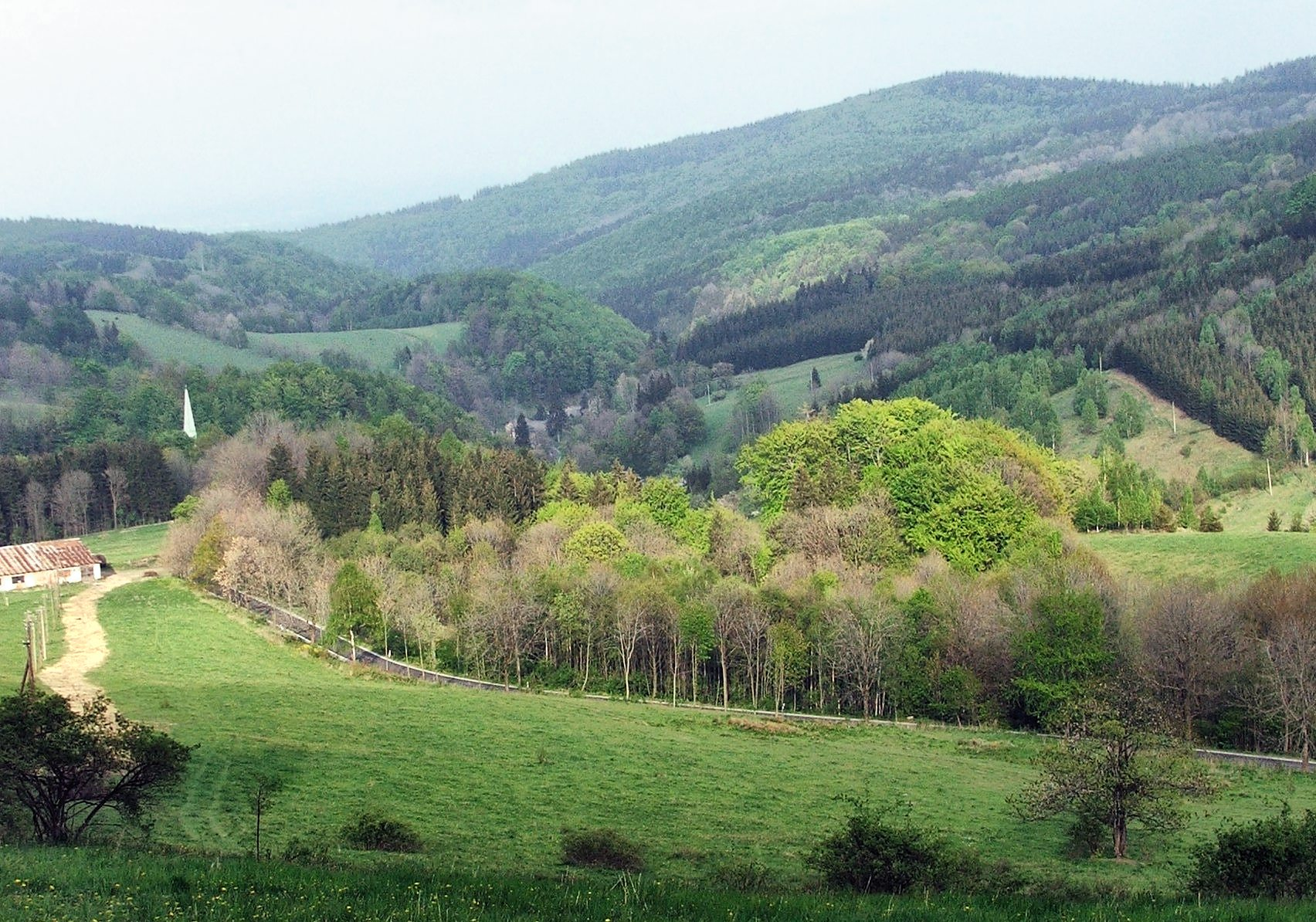 Czeska wieś Zálesí położna w pobliżu przejścia granicznego Lutynia-Travná (gmina Javorník, okręg Jeseník)